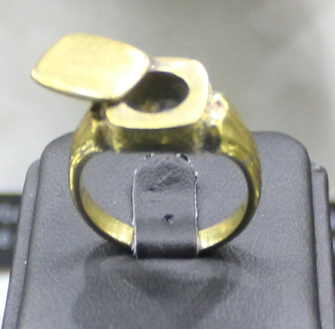 MM Parc France, Ring von Pierre Verges ("Le Teyrac") mit Behältnis für Zyanidkapsel